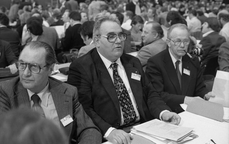 Außerordentlicher Parteitag der SPD im Messe-Kongreß-Zentrum in Köln zur Vorbereitung für die Europa-Parlament-Wahl 1979